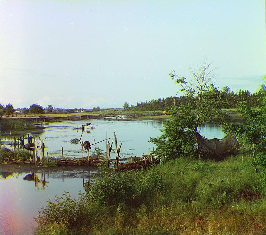 Mineral springs near river Pyshma, Sverdlovsk Oblast, Russia. TITLE: Река Пышма у минеральных водTITLE TRANSLATION: Pyshma River at the mineral springs